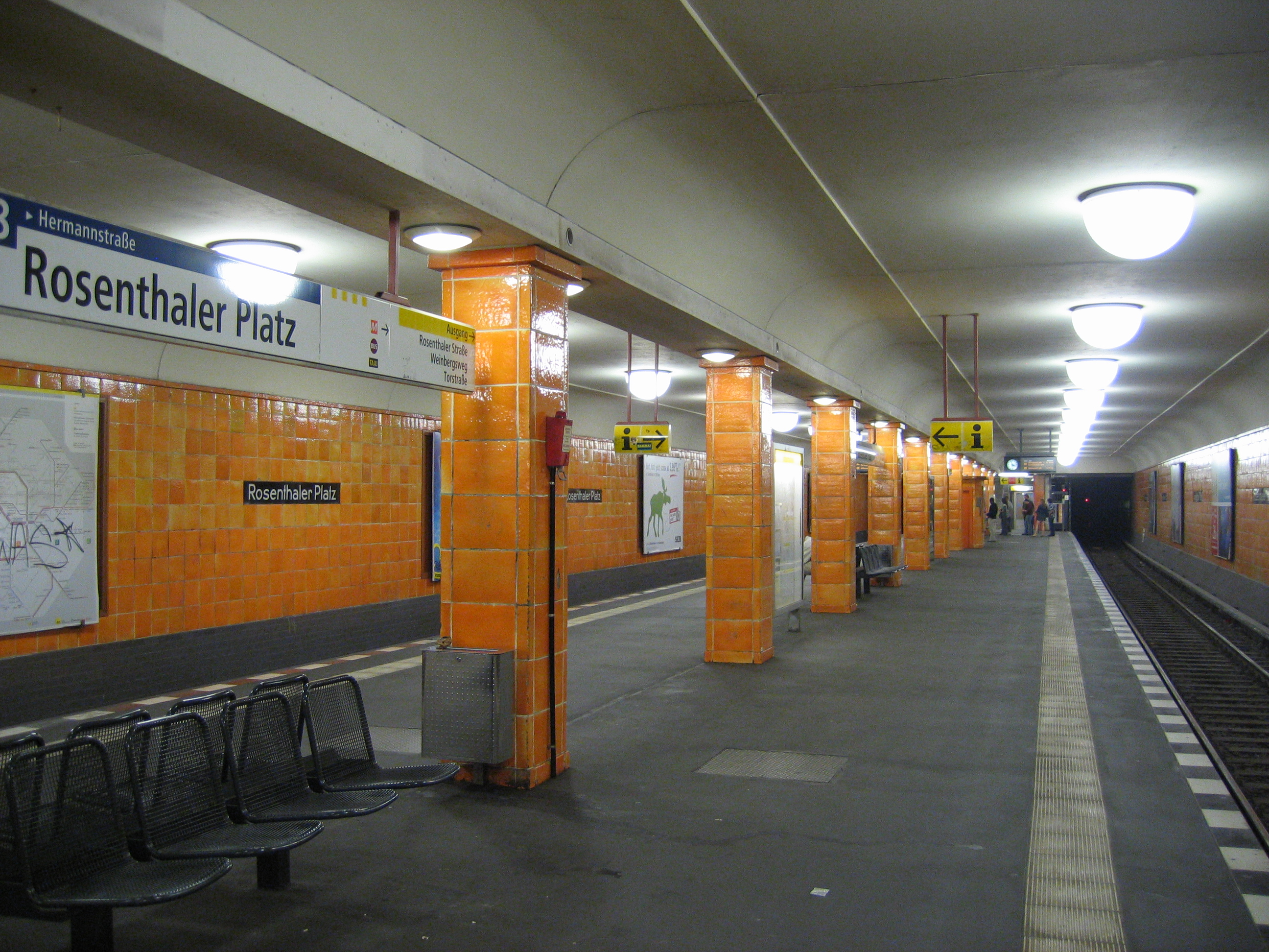 U-Bahnhof Rosenthaler Platz, Berlin